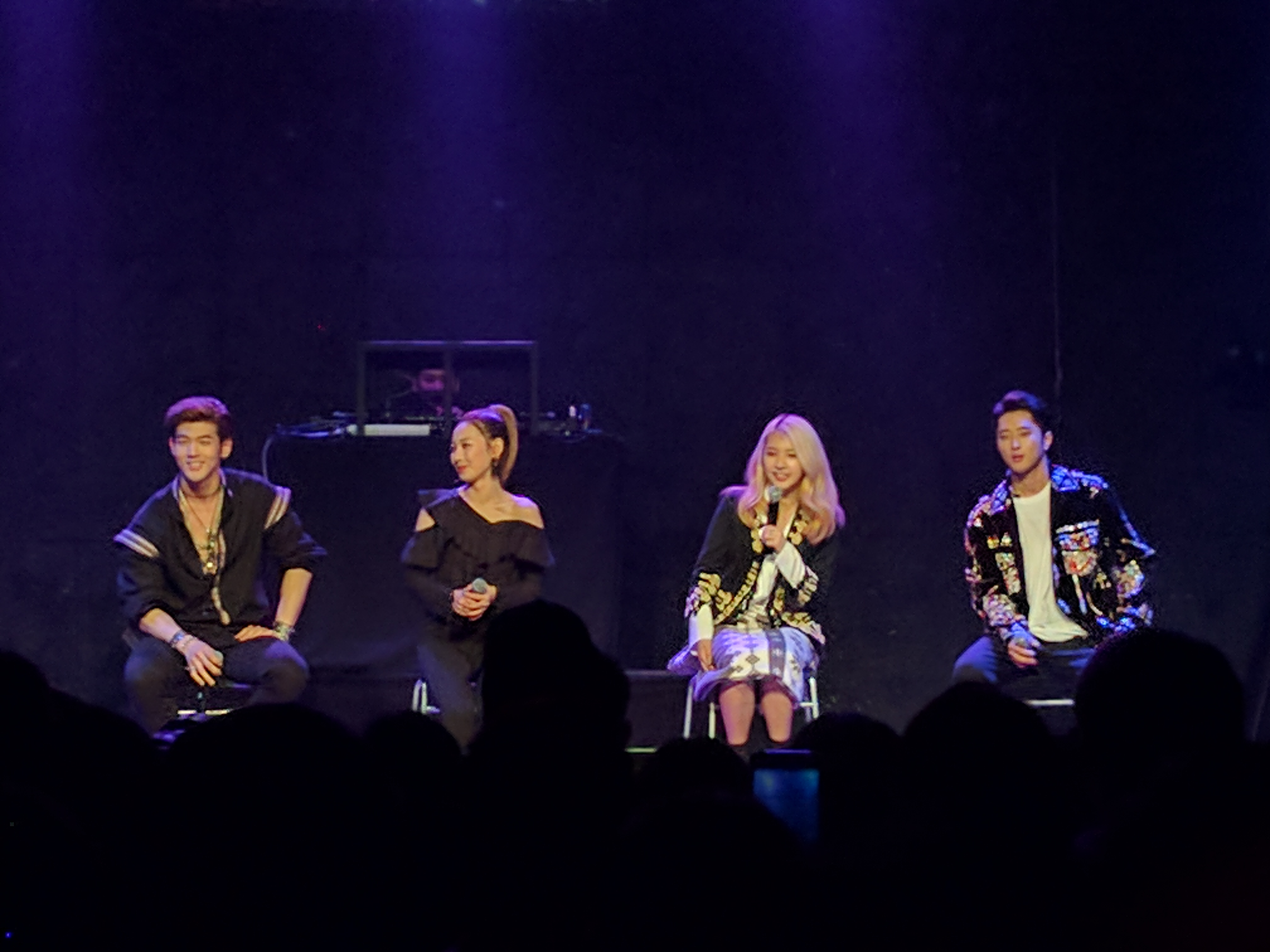 2017년 4월 25일 와일드 카드 파티에서 K.A.R.D